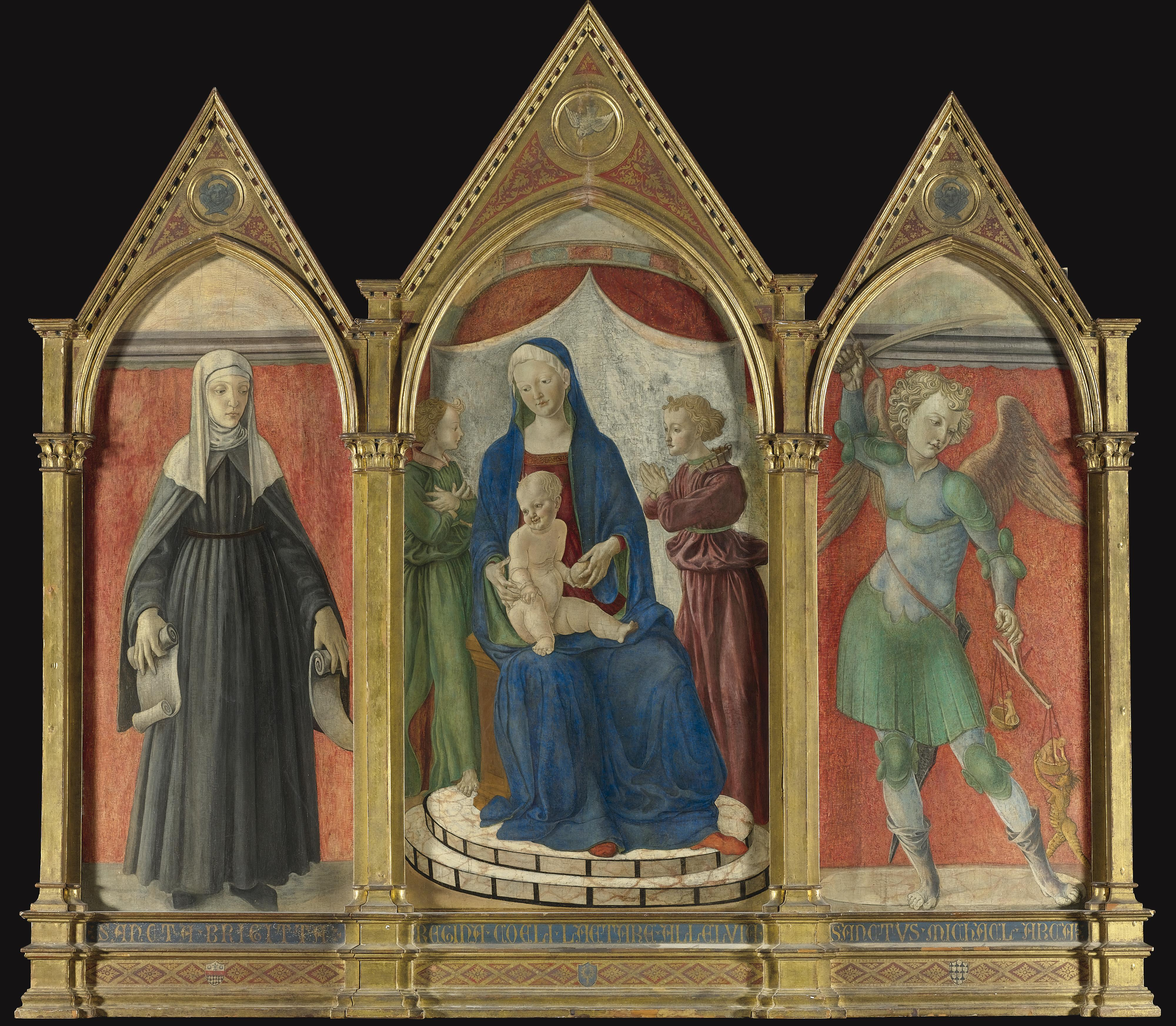 Maestro di Pratovecchio, trittico con Maestà, Santa Brigida e san Michele